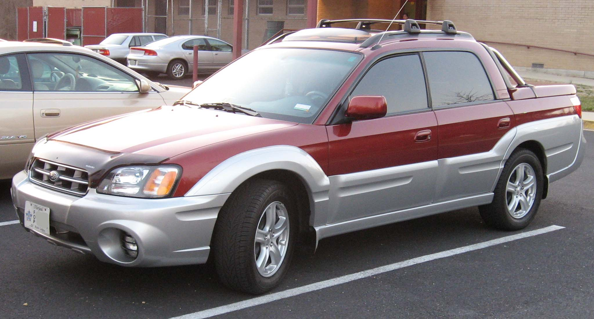 2002-2006 Subaru Baja photographed in USA.